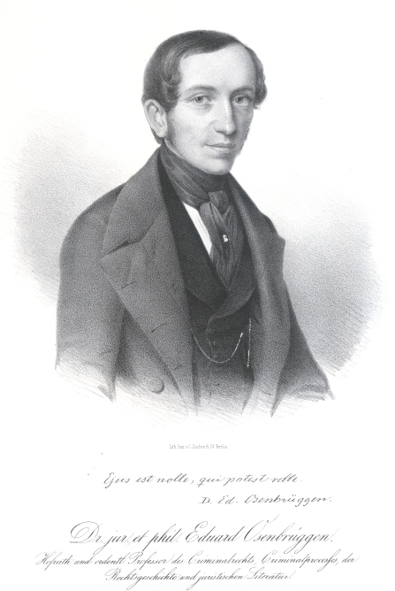 Eduard Osenbrüggen, saksa õigusteadlane